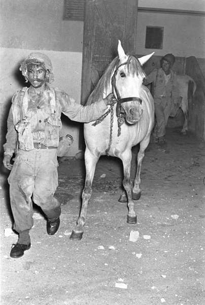 פעולת קלקיליה (מבצע "שומרון"), לוחמים מפנים סוס לפני הפיצוץ.